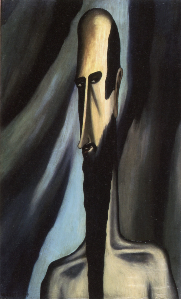 D. Quixote